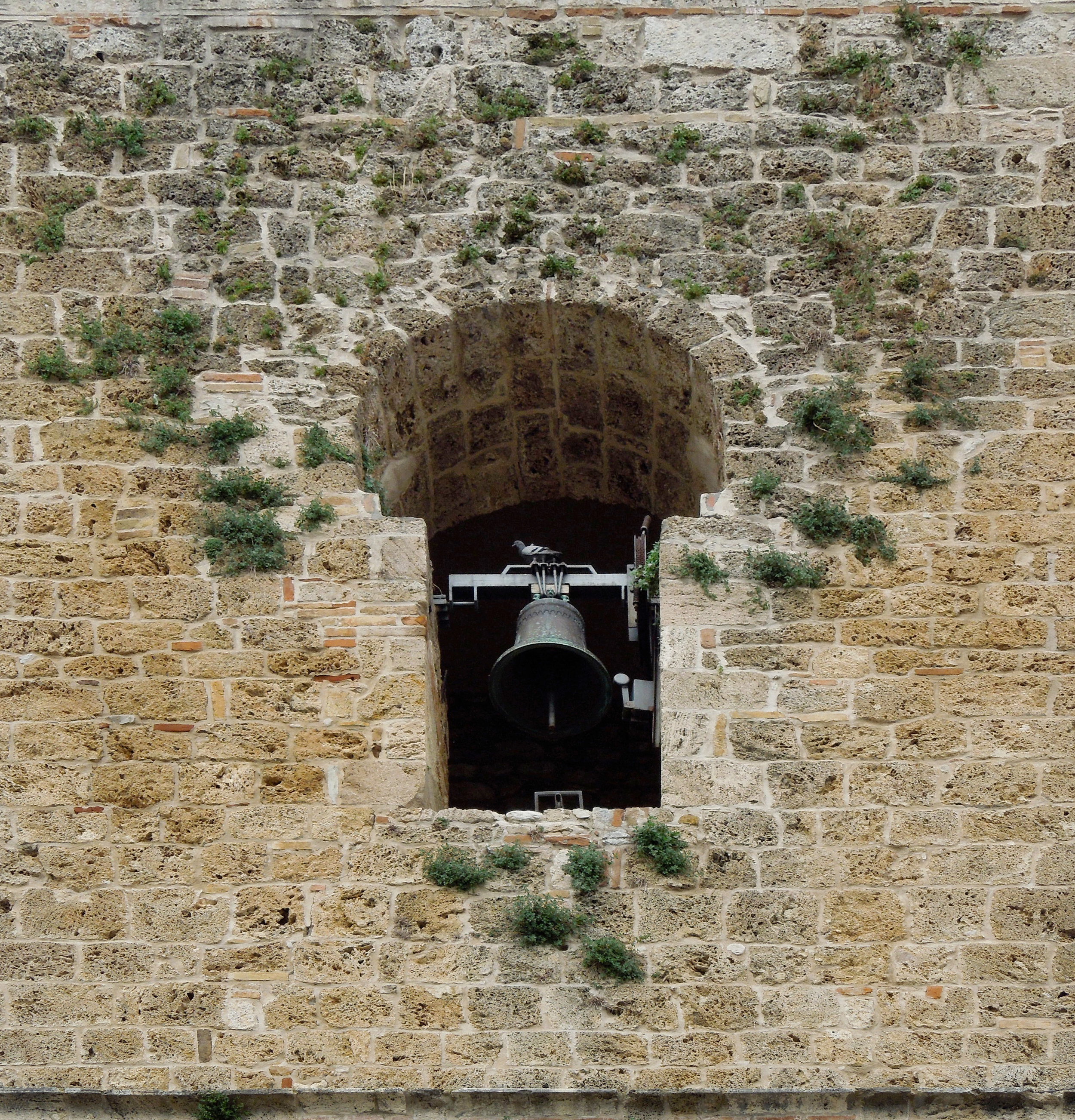 Finestra ad arco a ferro di cavallo della Torre del Melatino di Nocella di Campli in provincia di Teramo.